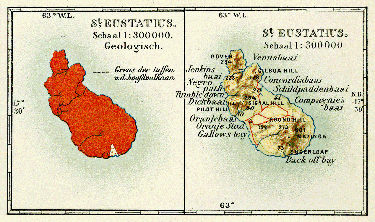 St. Eustatius - Karte aus der Enzyklopädie der Niederländischen Antillen.